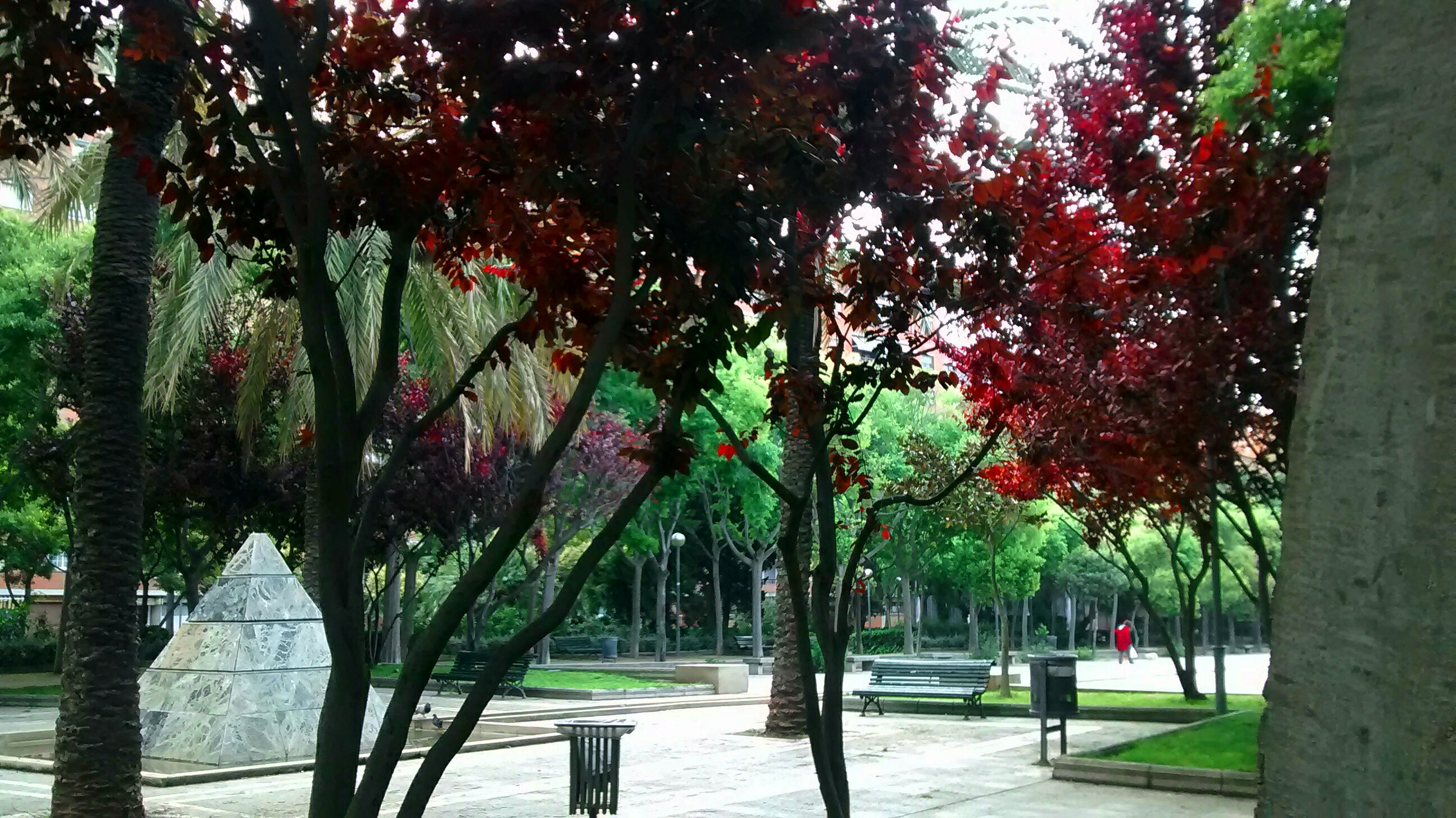 Espacio del elemento escultórico pirámide